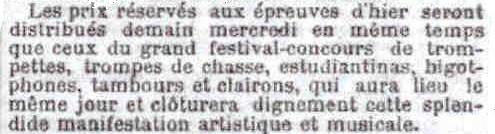 Extrait de l'article du Petit Parisien sur le concours de musique de Puteaux en août 1900.